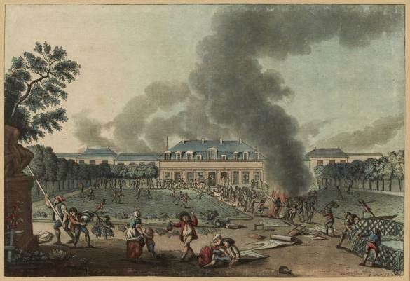 De vernielingen rond huis van Réveillon op 28 april 1789. 18e eeuwse prent afkomstig van franse website saccage de la Folie Titon-Pillage de la maison Réveillon au faubourg Saint-Antoine le 28 avril 1789